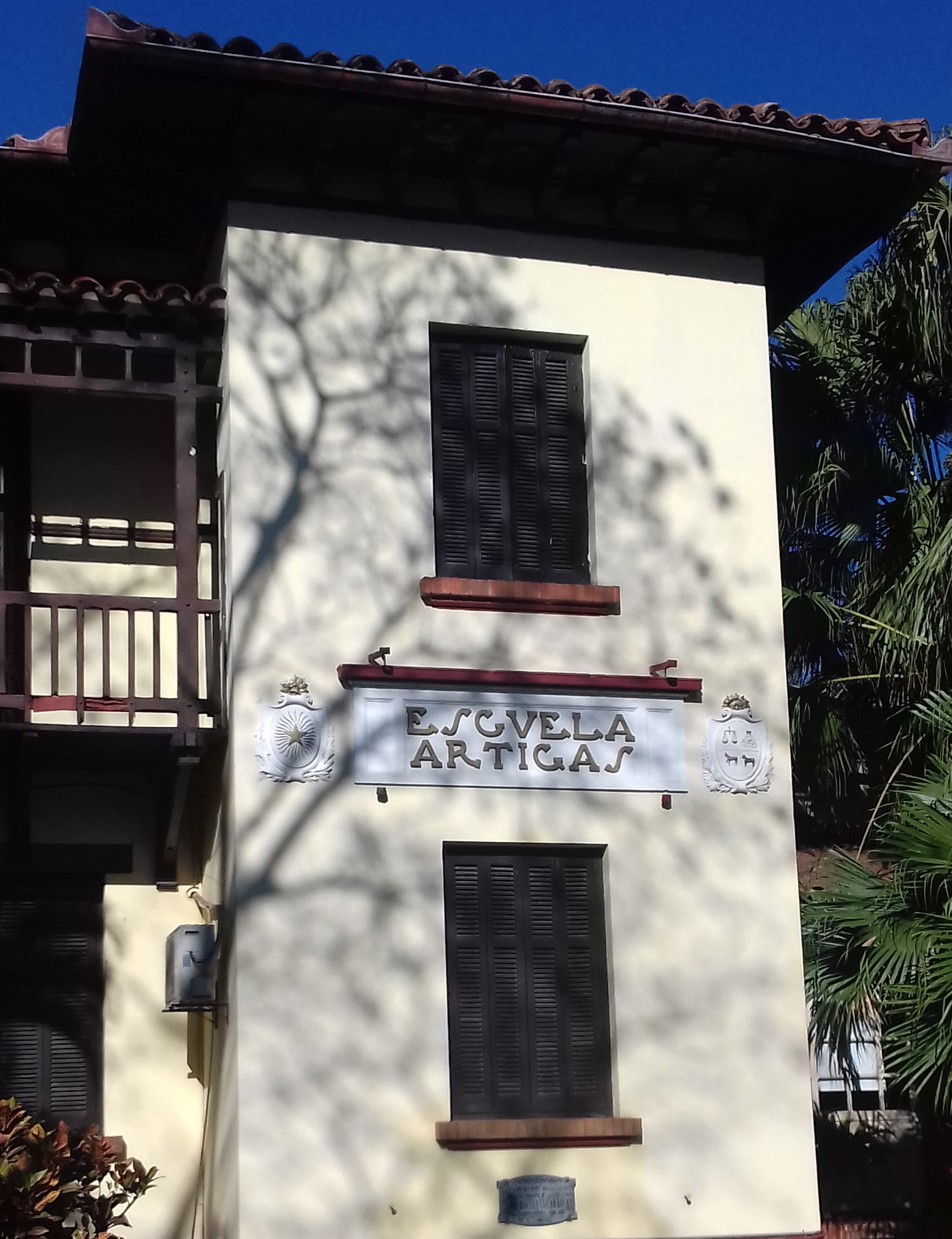 Como legado de la hermandad que unen al Paraguay y Uruguay, funciona en Asunción, desde el año 1924 la escuela Solar de Artigas. Enclavada en un recodo del Jardín Botánico, fue el lugar donde el general Gervasio Artigas; impulsor de la independencia uruguaya, pasó los últimos años de su vida en situación de exilio.